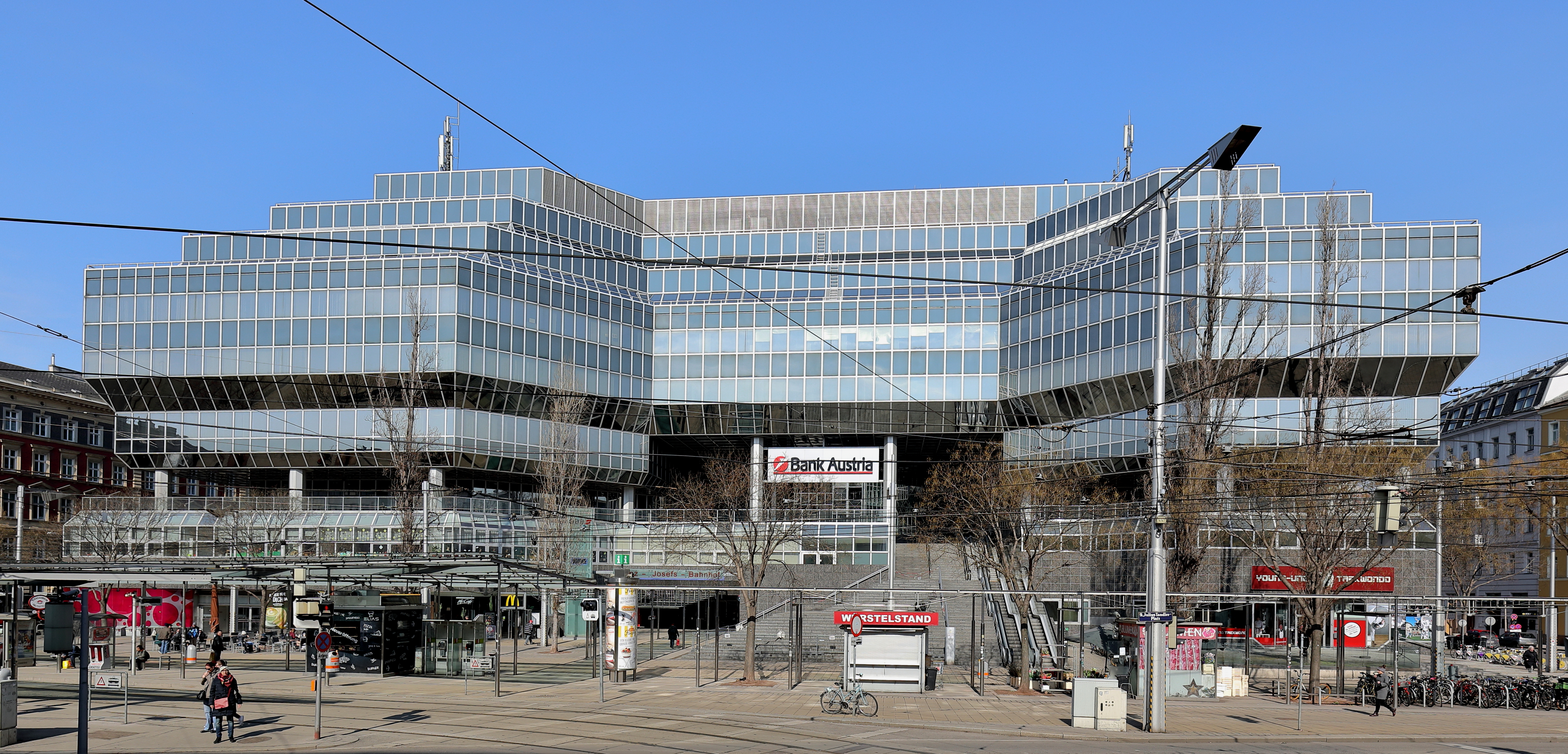 Die Überbauung, ein Handels- und Dienstleistungbaukomplex, und der Eingangsbereich des Franz-Josefs-Bahnhofes im Bereich Julius-Tandler-Platz im 9. Wiener Gemeindebezirk Alsergrund. Ab Ende 1974 wurde der alte Bahnhof (1872 eröffnet und mehrfach umgebaut) abgerissen und anschließend die Überbauung nach einem Konzept der Architekten Kurt Hlaweniczka und Karl Schwanzer bis 1982 realisiert, wobei der Bahnhof selbst 1978 fertiggestellt war. Es war Wiens erster Bahnhof neuen Typus, bei dem der Eisenbahnbetrieb nur noch Teil eines Handels- und Dienstleistungskomplexes ist.